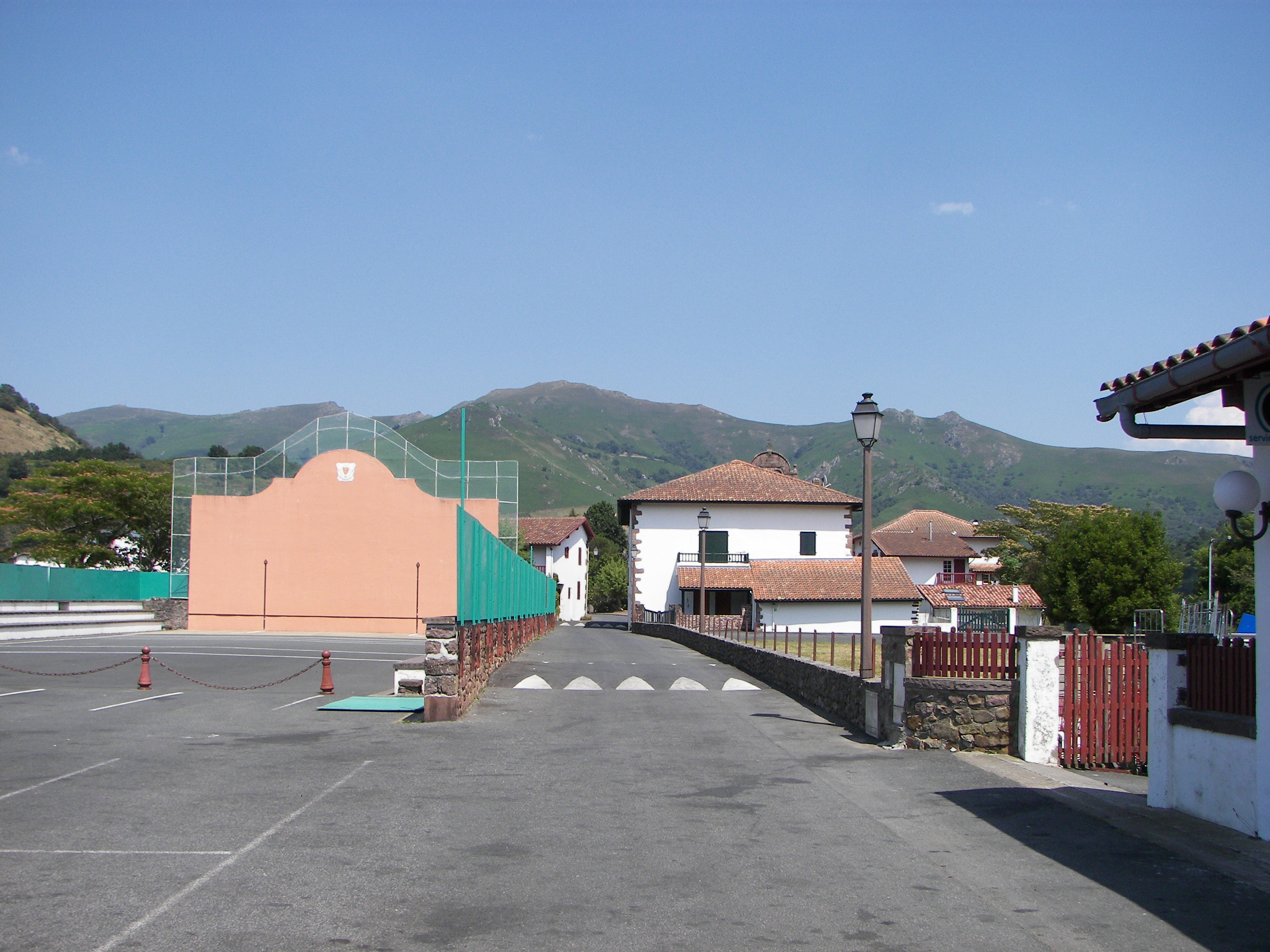 Fronton de Bidarray (Pyrénées-Atlantiques).